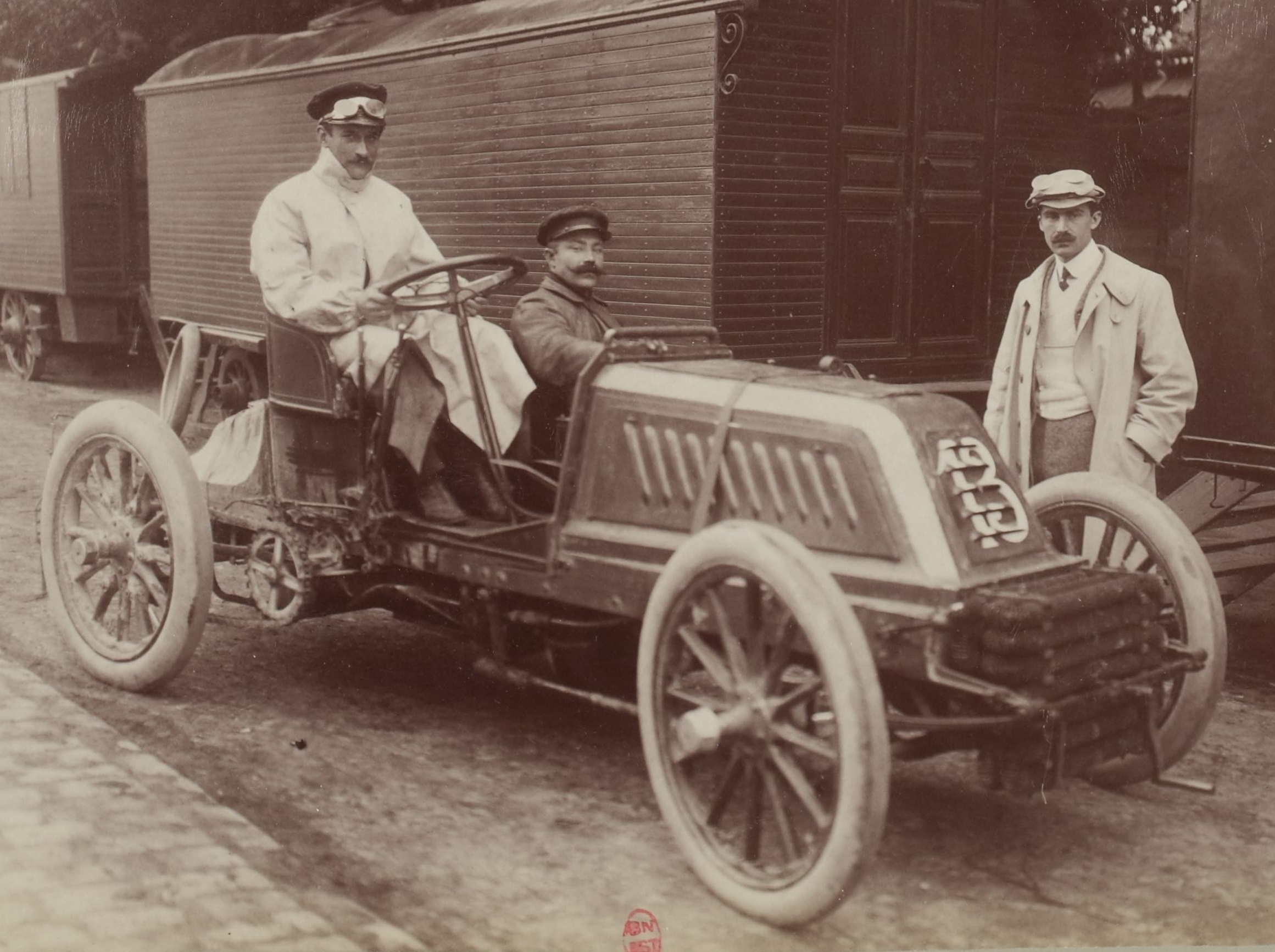 [Collection Jules Beau. Photographie sportive] : T. 18. Année 1902 / Jules Beau : F. 45v. [Circuit des Ardennes, Bastogne, 30 juillet 1902]